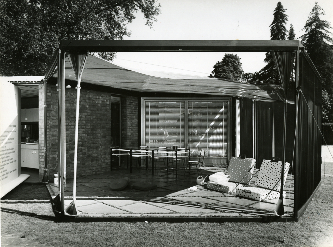 Servizio fotografico : Como, 1957 / Paolo Monti. - Stampe: 13 : Positivo b/n, gelatina bromuro d'argento/ carta, 18x24. - ((Al verso delle stampe manoscritti i numeri dei negativi corrispondenti? secondo altra numerazione: 52, 53, 54, 57, 61, 62, 63, 64, 65 (lo stesso numero identifica 2 stampe - 2 copie), 74; iscrizioni didascaliche (anche in lingua francese) manoscritte a penna e a matita, alcune dattiloscritte su striscia adesiva in carta bianca; timbro a inchiostro con copyright (Foto "Fotogramma" s.r.l. - Via Colonna - Milano". - Sul coperchio della scatola iscrizione didascalica manoscritta a pennarello nero. "Archit. Moderna". - La mostra, patrocinata dal comune di Como e dal Comitato di villa Olmo a cura dell'Associazione Belle Arti della provincia di Como, si tenne nei mesi di luglio-agosto 1957